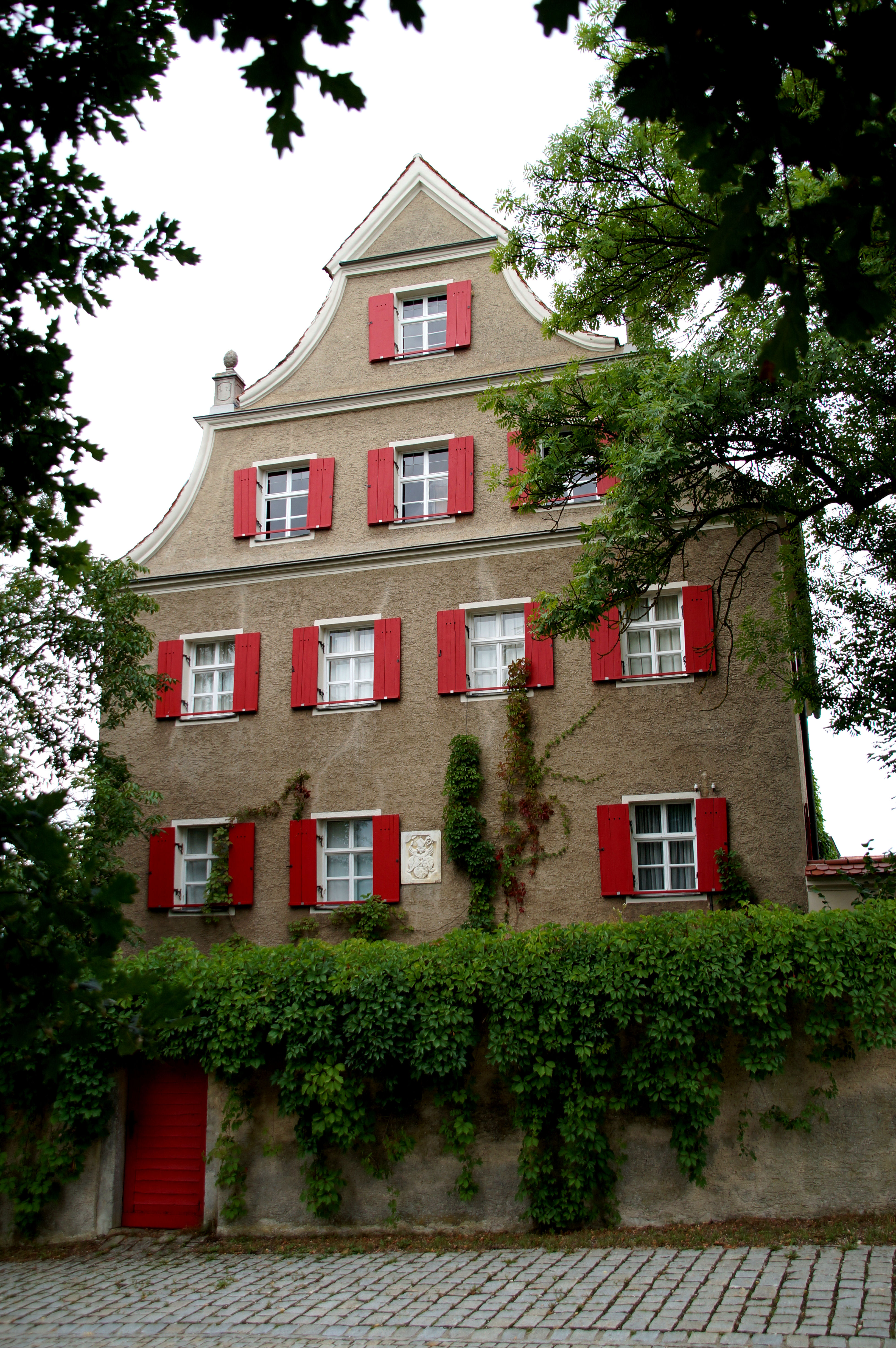 Schloss Hohengebraching, ehem. Sommersitz der Abtei St. Emmeram, Neues Schloss, dreigeschossiger Satteldachbau mit Giebelfront und Wappentafel, 1727, mit älteren Bauteilen von 1573 und 1670.